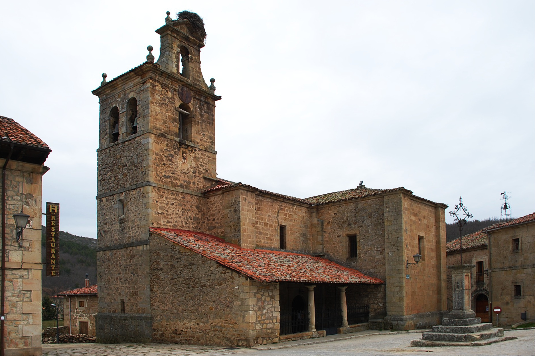 Iglesia de San Martín de Tours en Molinos de Duero, (Soria).